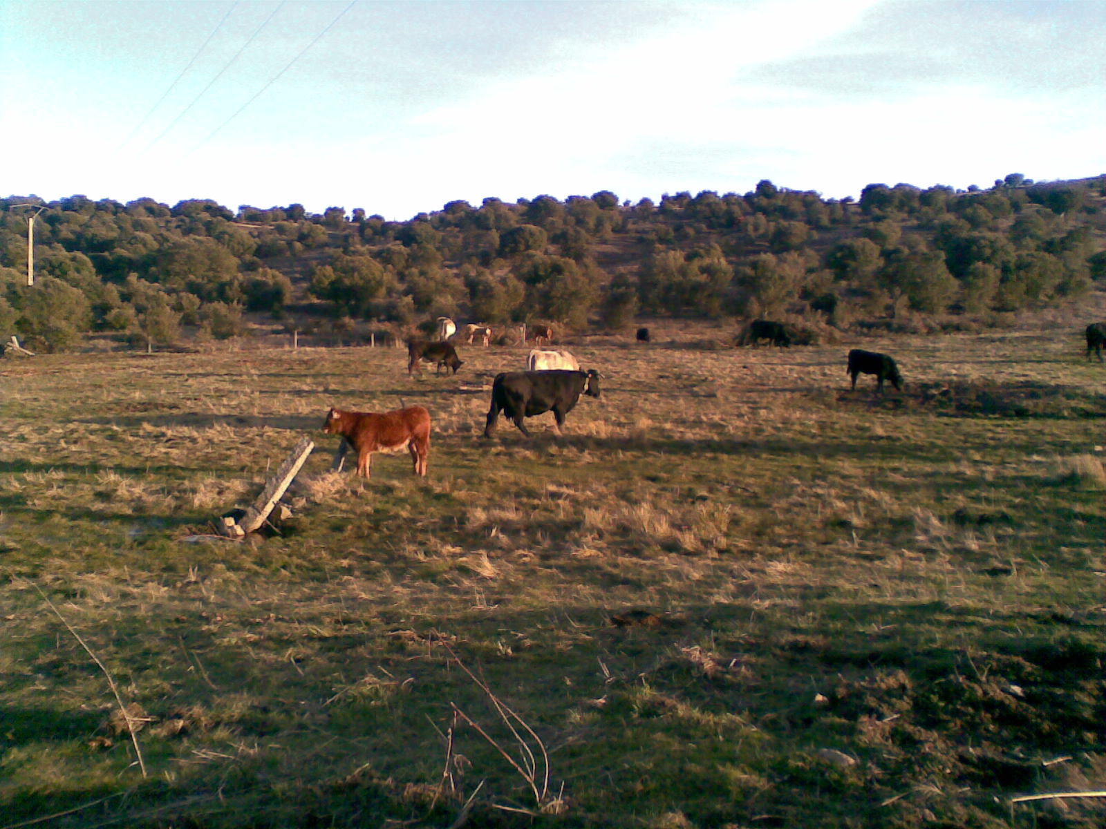 prados donde pasta el ganado de forma libre (sin estabular)